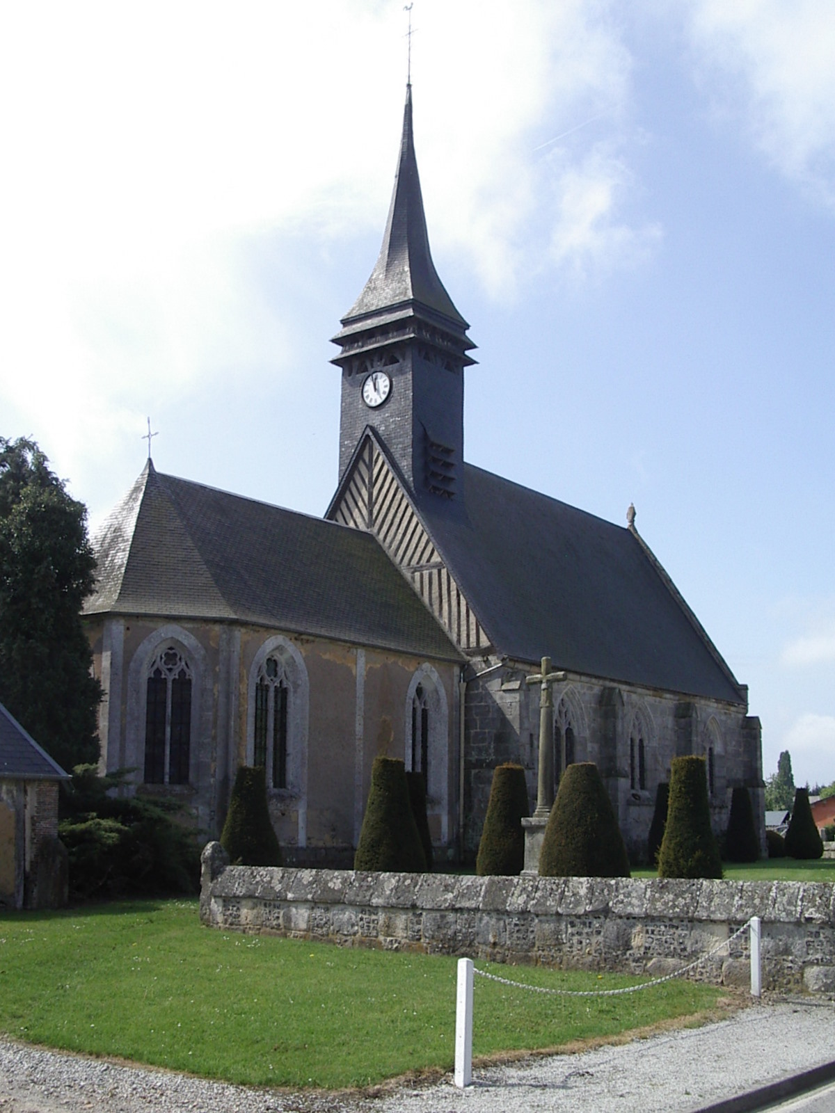 Eglise de Jonquerets-de-Livet (France, Eure)